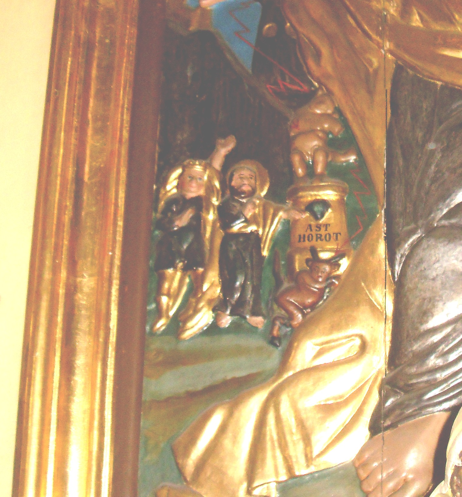 Scena zburzenia przez św. Barłomieja ołtarza Astarte (Kościół św. Bartłomieja w Czańcu koło Kęt)